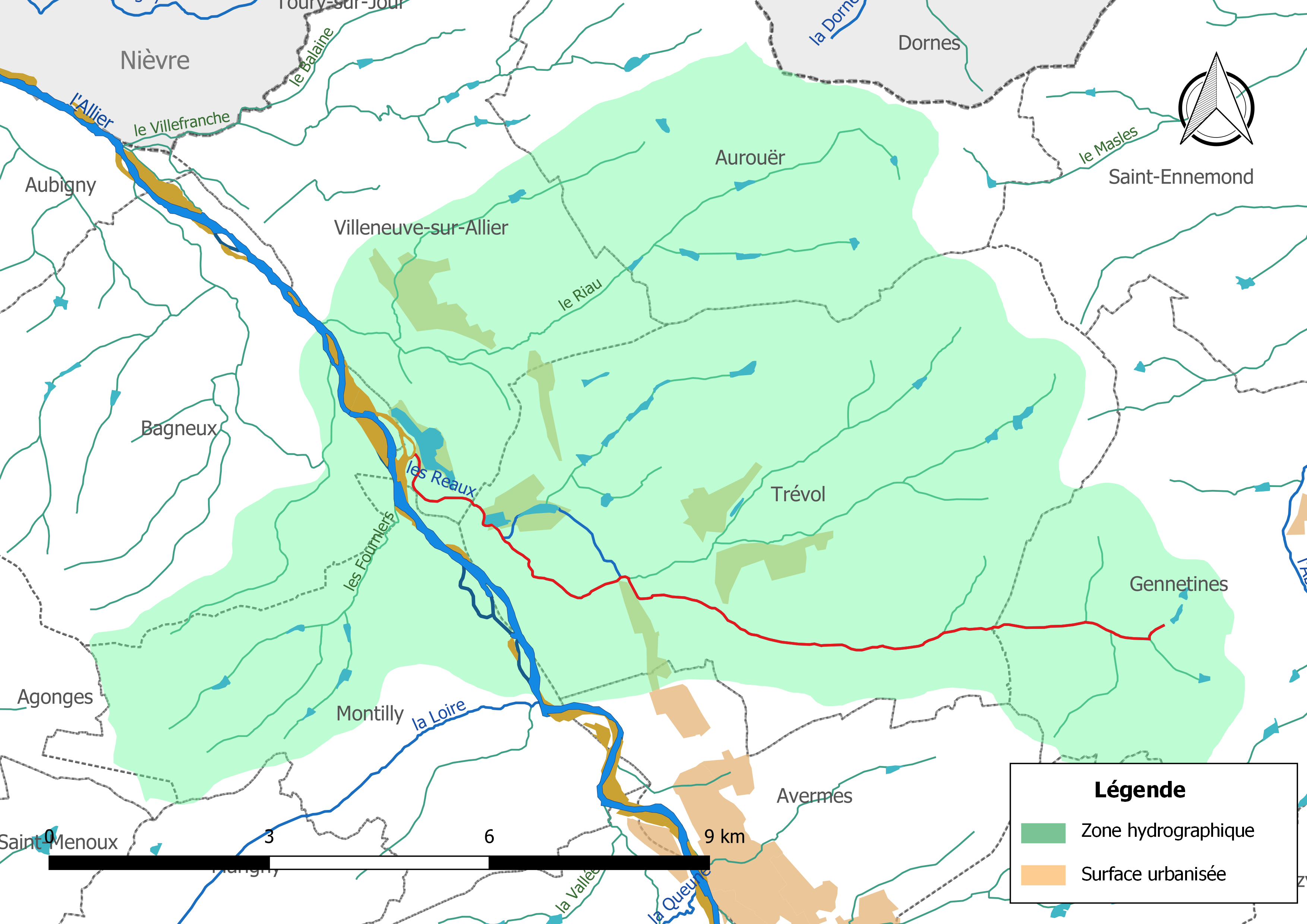 Carte du cours d'eau « le Reaux » (France) et de la zone hydrographique dans laquelle il s'insère.